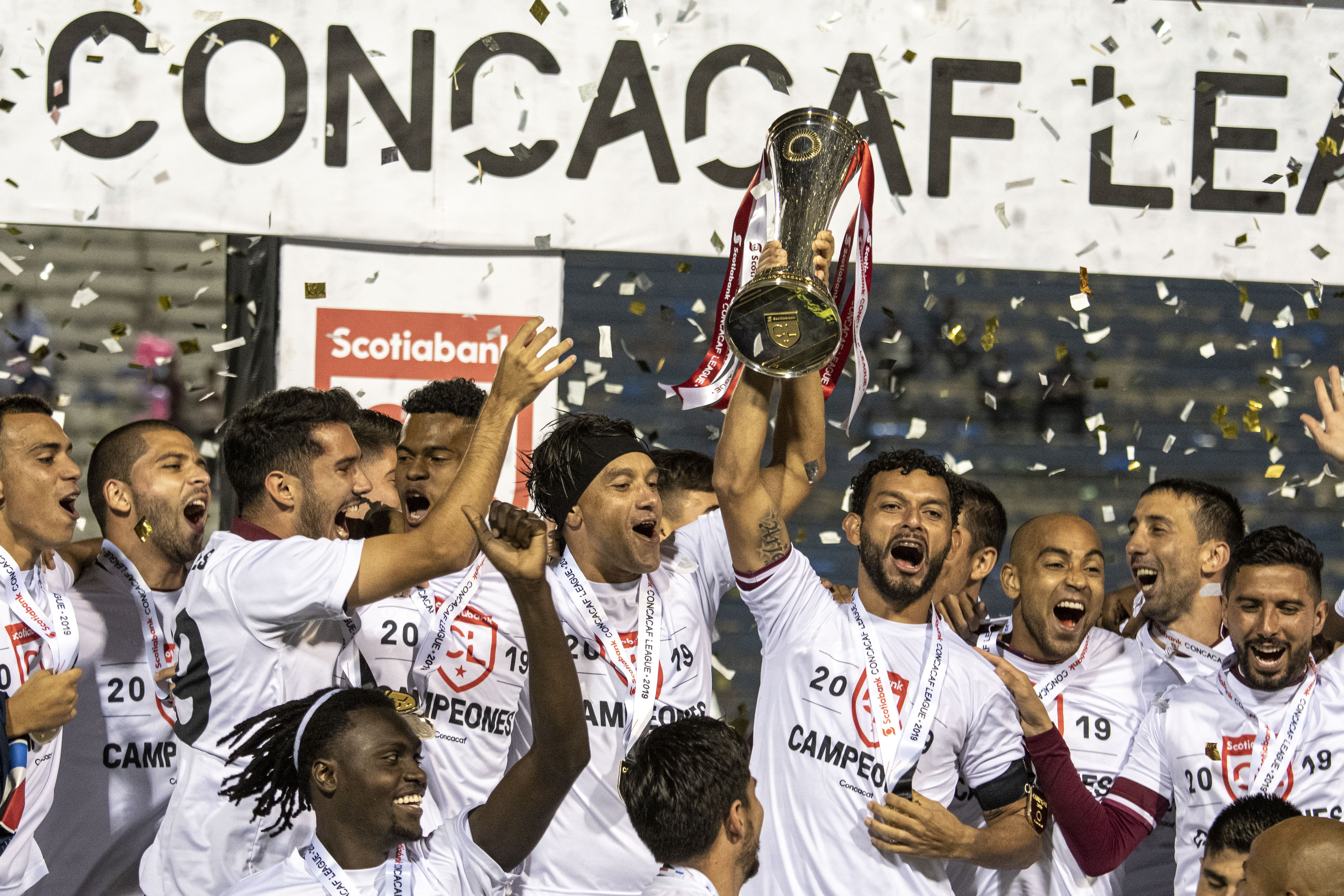 El Deportivo Saprissa festeja su trofeo de campeón de Liga Concacaf tras empatar 0-0 ante el Motagua en el Estadio Nacional de Tegucigalpa. En la fotografía Michael Barrantes y Christian Bolaños levantan el trofeo.